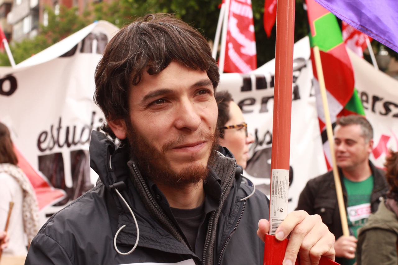 Foto de Jon Hernández, Secretario General del Partido Comunista de Euskadi (PCE-EPK) y miembro del Parlamento Vasco por Ezker Anitza-IU.